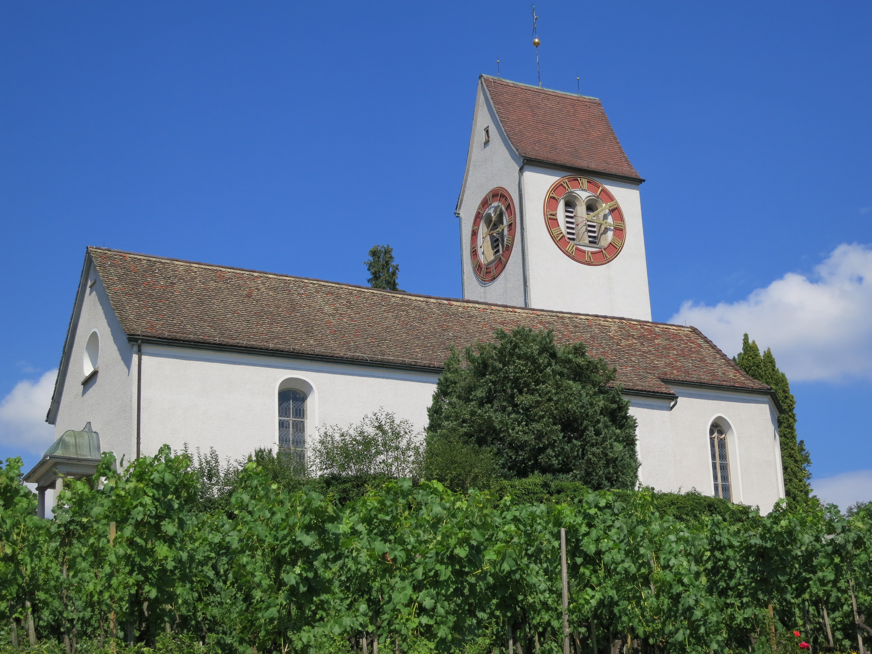 Kirche Weiningen ZH, Schweiz